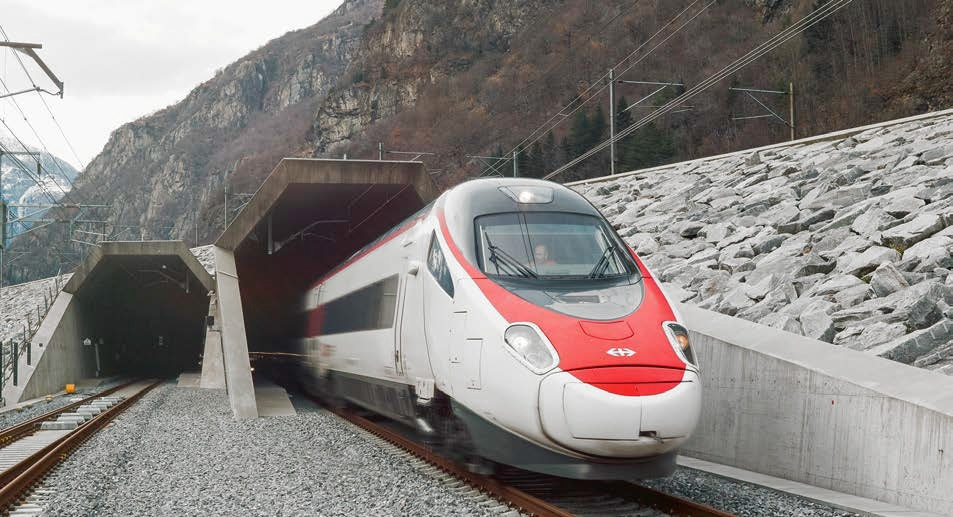 Zugsausfahrt aus dem Süd-Portal des Gotthard-Basistunnels